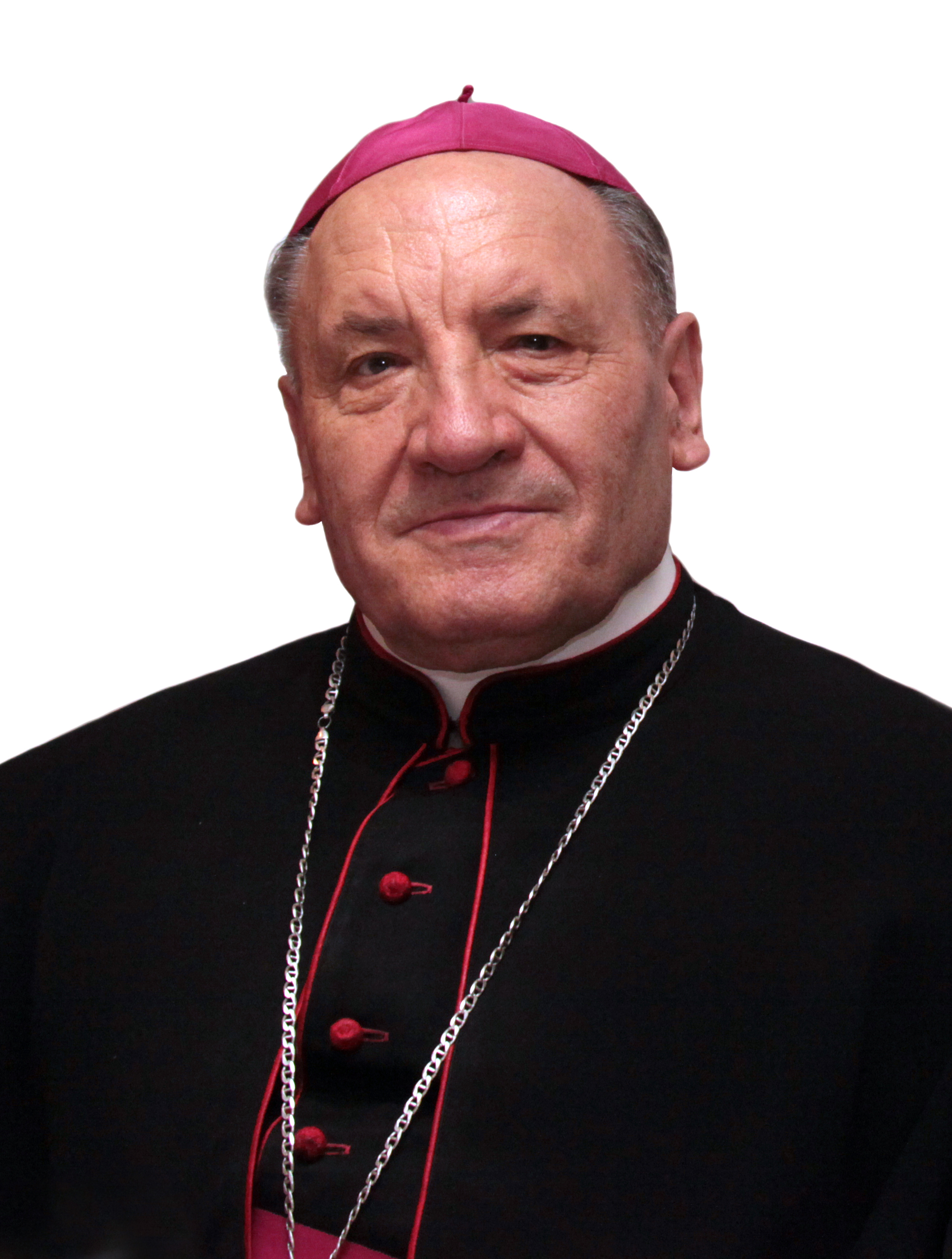 Ян Пурвінський